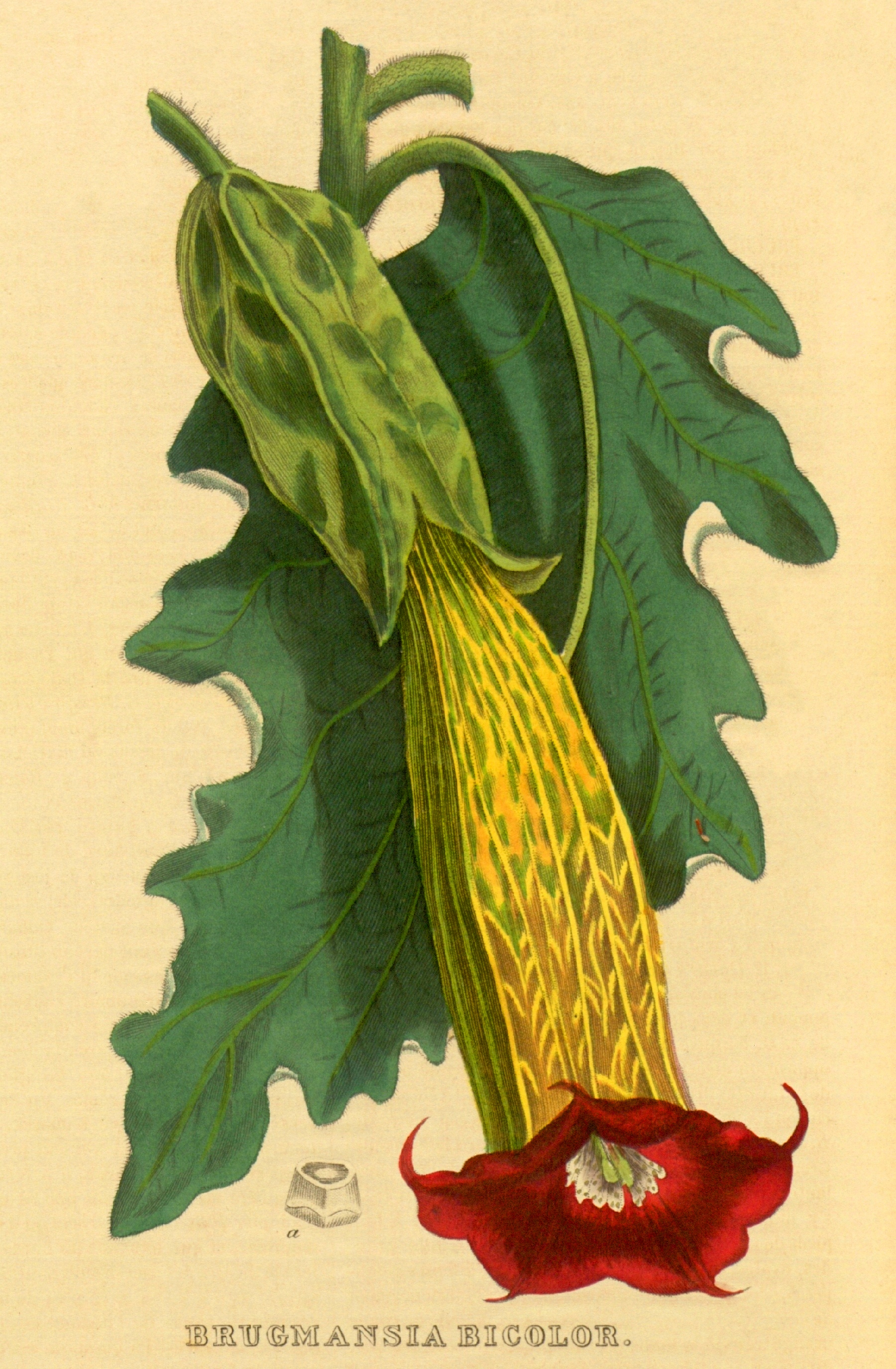 Brugmansia sanguinea syn. Brugmansia bicolor See